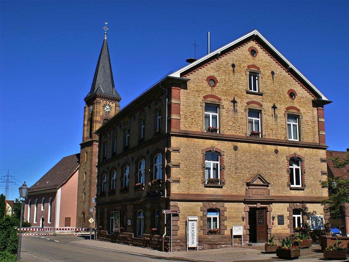 Ölbronn - Rathaus + Kirche